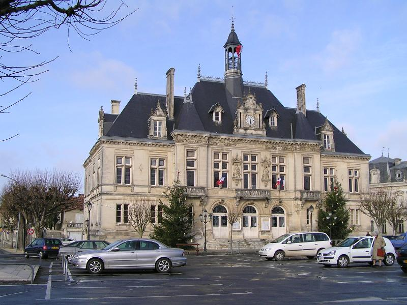 mairie de Saint-Jean-d'Angély